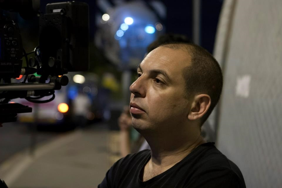 יוסי ארצי הבמאי